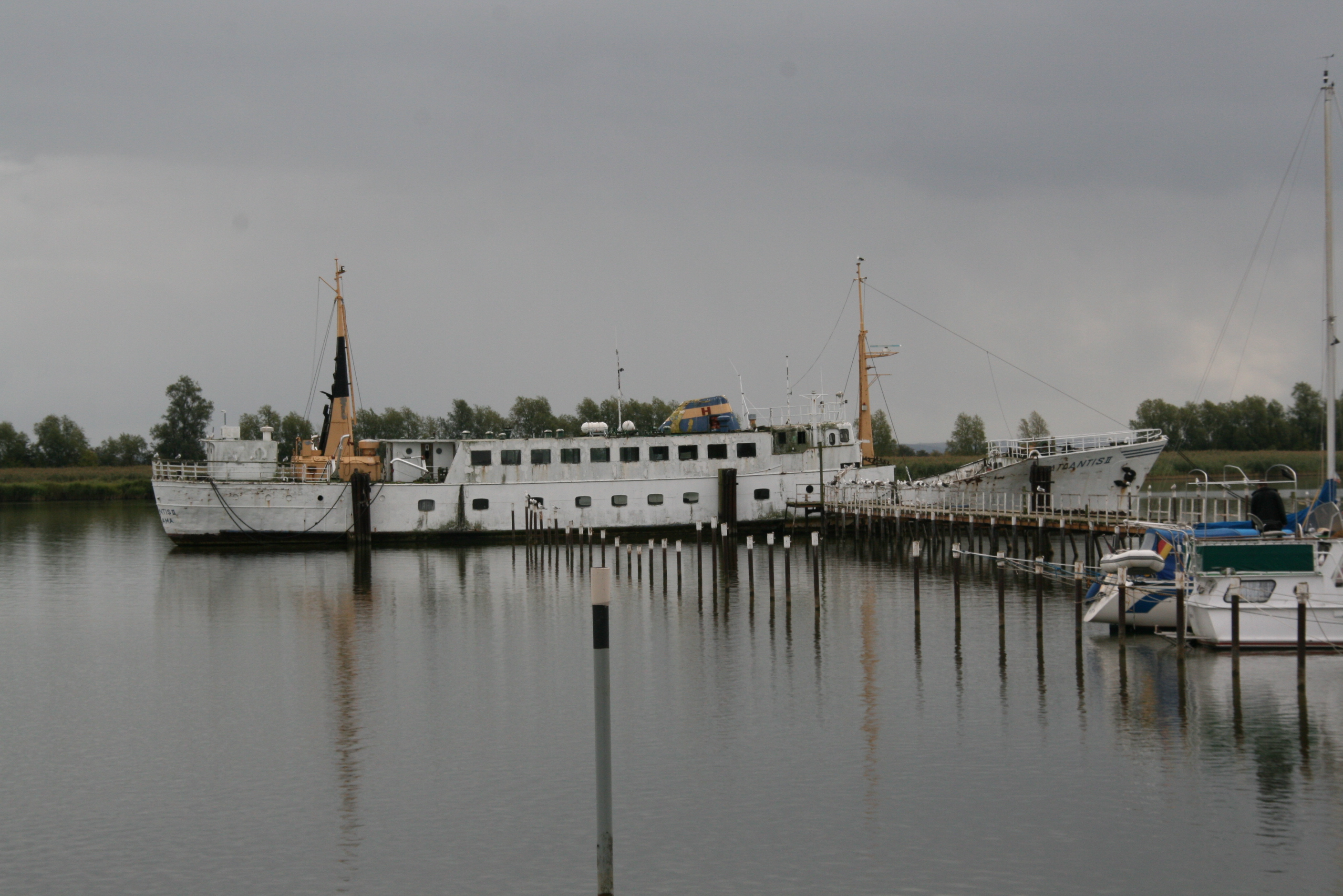 MS Atlantis II im schlechten Zustand